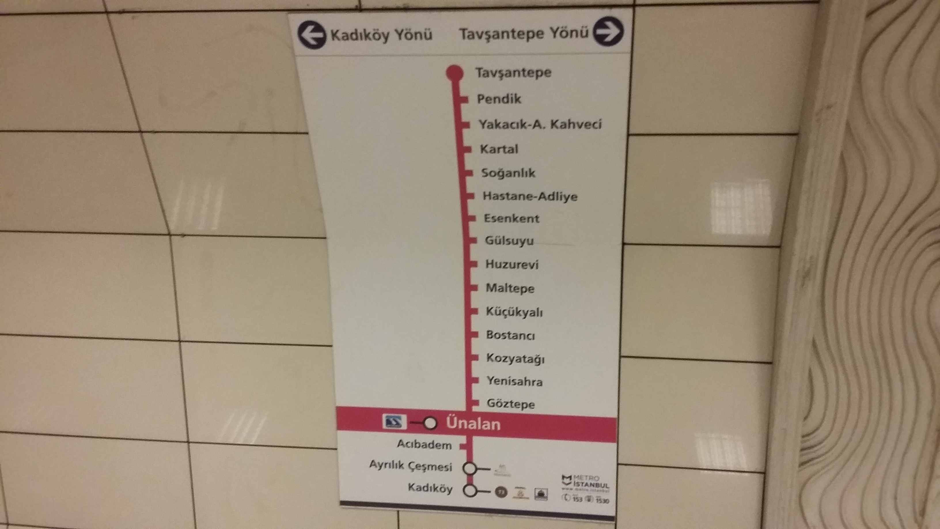 M4 Kadıköy - Tavşantepe Metrosu